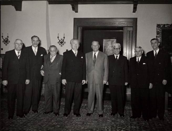 Prijem članova Prezidijuma Narodne skupštine FNRJ 1953. godine